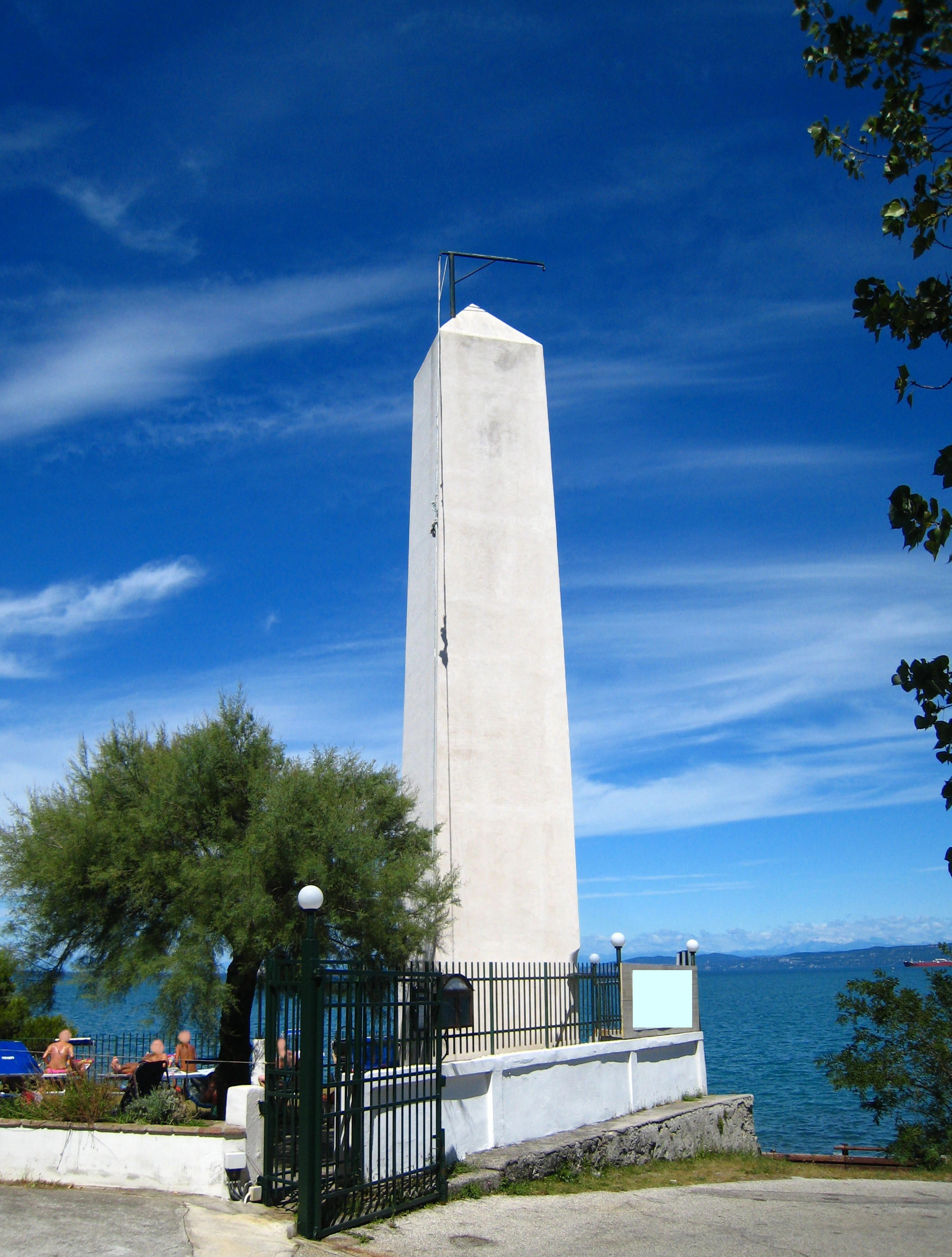 Il dromo di Punta Sottile nel golfo di Trieste, in comune di Muggia. Agosto 2008. - La fotografia mostra di spalle quello inferiore, unico superstite, dato che quello superiore è crollato o, più facilmente, è stato demolito nel periodo della seconda guerra mondiale. Una coppia uguale si trovava oltre l'attuale confine con la Slovenia su Punta Grossa (Debeli Rtič). Sono segnalati sulle carte dei Litorali edite dall'Istituto Idrografico della Marina.